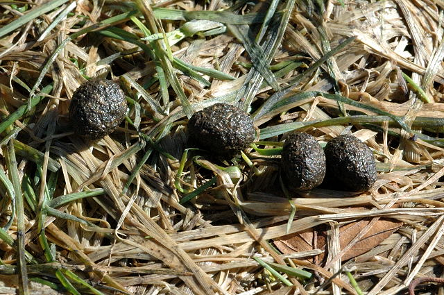 Lepus europaeus droppings, from Commanster, Belgian High Ardennes (50°15'20"N 5°59'58"E)